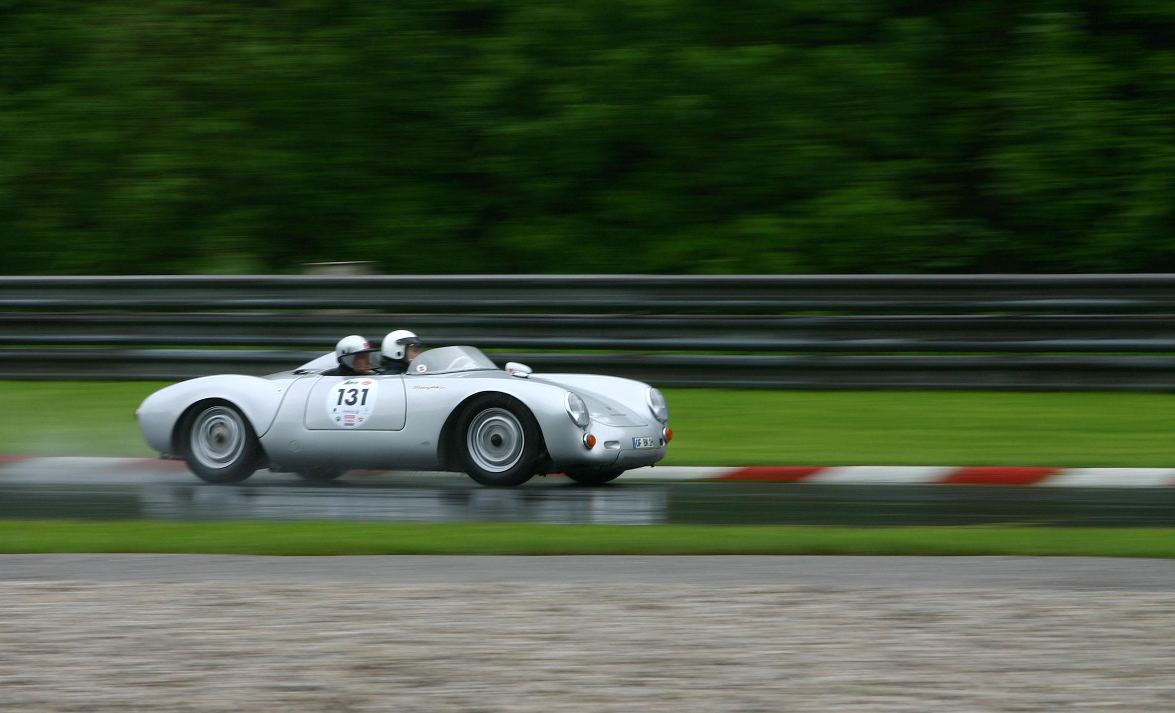 Porsche 550 RS, 1955, 1600ccm, 120PS at Gaisbergrennen 2006